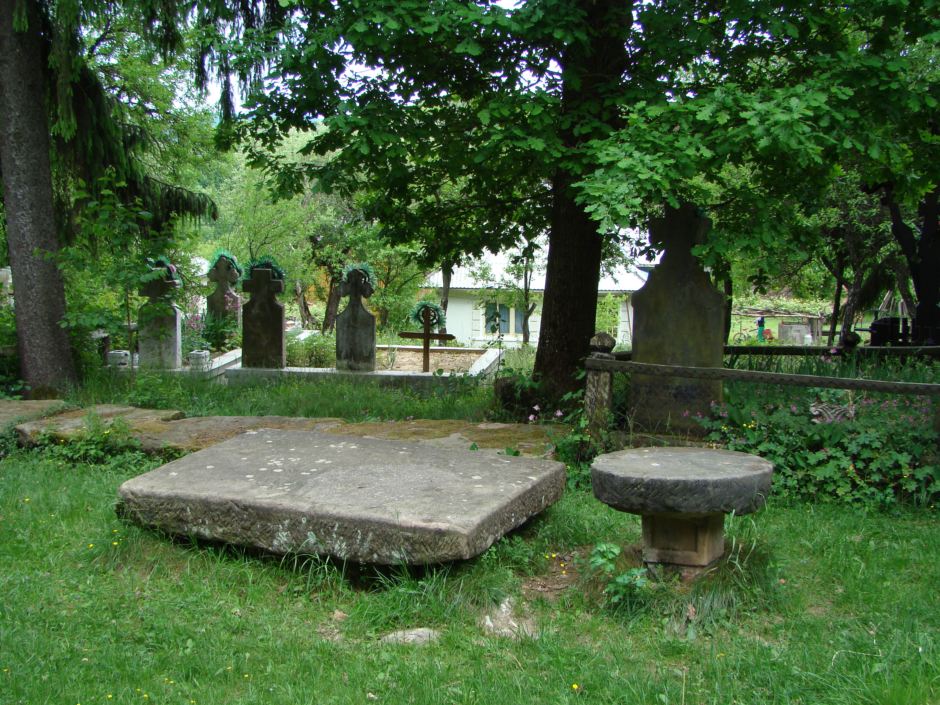 Biserica din Peteritea-cimitirul